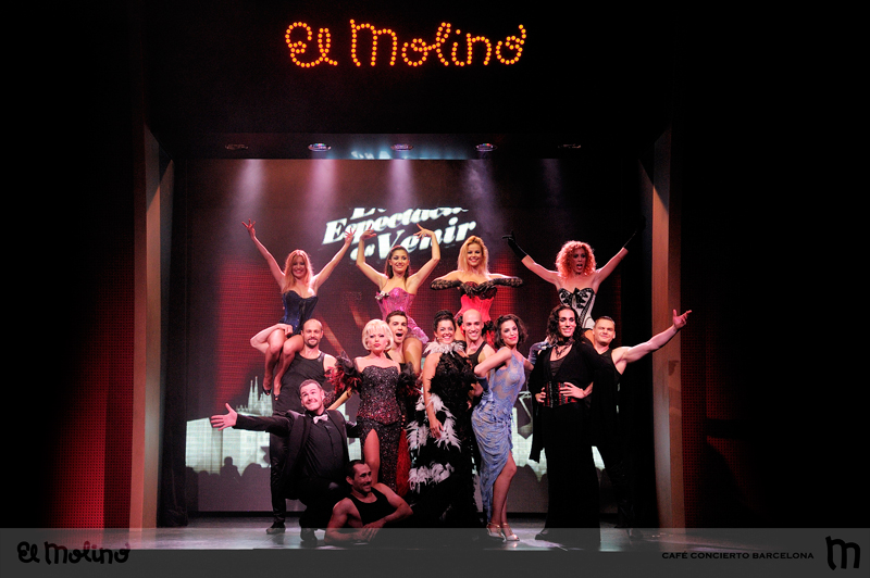 Foto de grupo del espectáculo "Live in Burlesque"